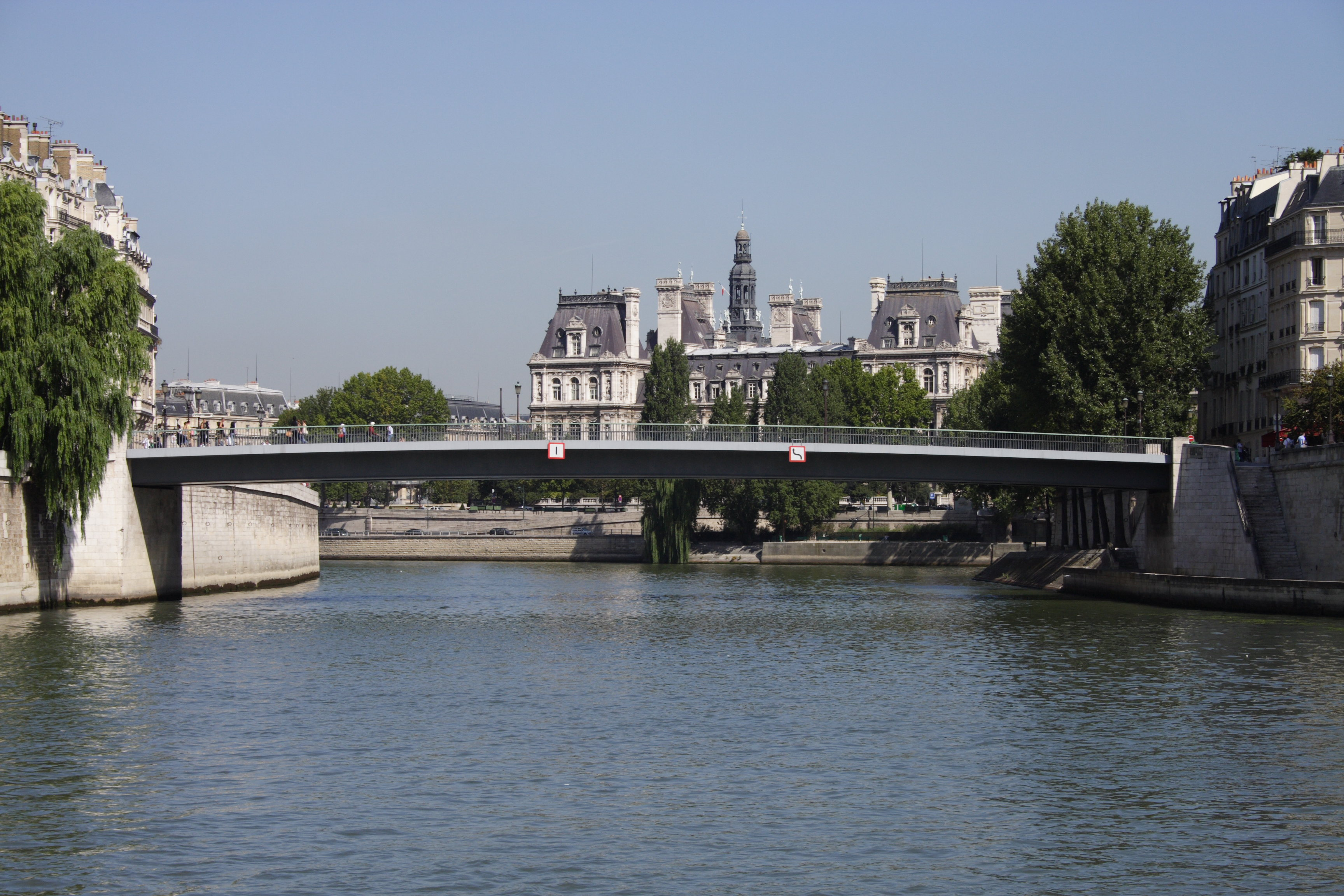 Pont Saint-Louis(Paris, France)